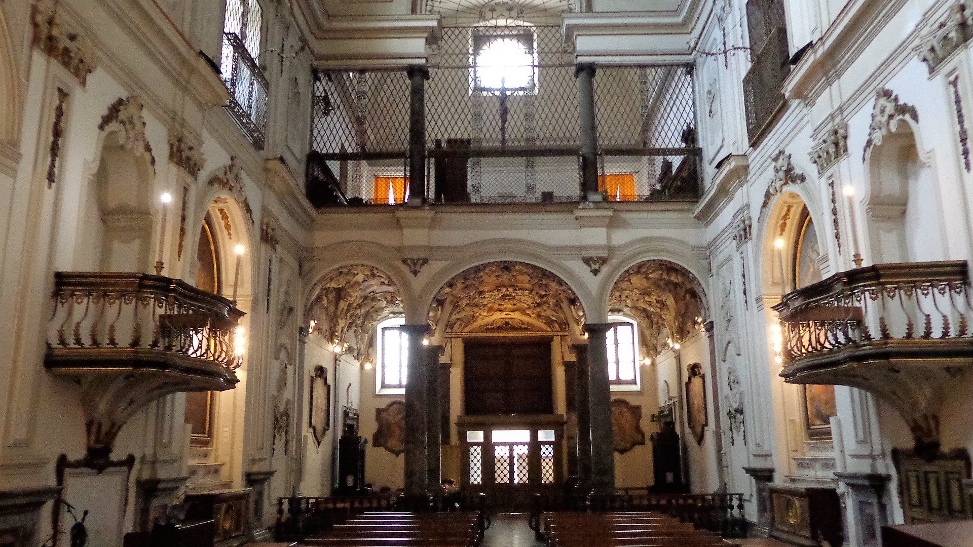 Controfacciata.